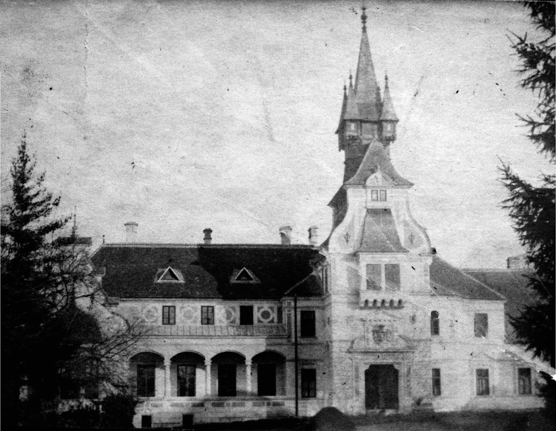 Bérbaltavár castle